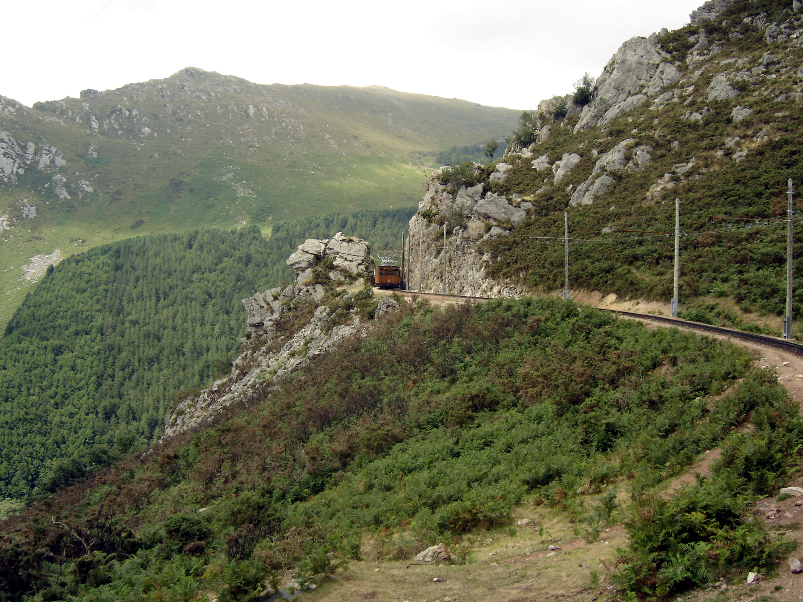 Petit train à crémaillère de La-Rhune